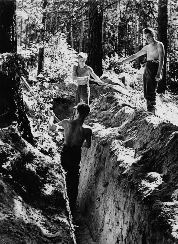 Ostpreussen, Schutzwallbau durch RAD RAD baut an Ostpreussens Schutzwall In der Front jener vielen tausender Ostpreussen jeden Alters und jeden Berufes, jeder Formation und jeder Gliederung, die am Schutzwall Ostpreussens schaffen, haben sich auch die Männer des RAD eingereiht und tragen mit ihrer Arbeit dazu bei, den bolschewistischen Todfeind das Betreten ostpreussischer Erde zu verwehren. UBz.: RAD-Männer beim Bau von Stellungen in einem Waldgelände. RAD-Kriegsberichter Tomaschek 11.8.44